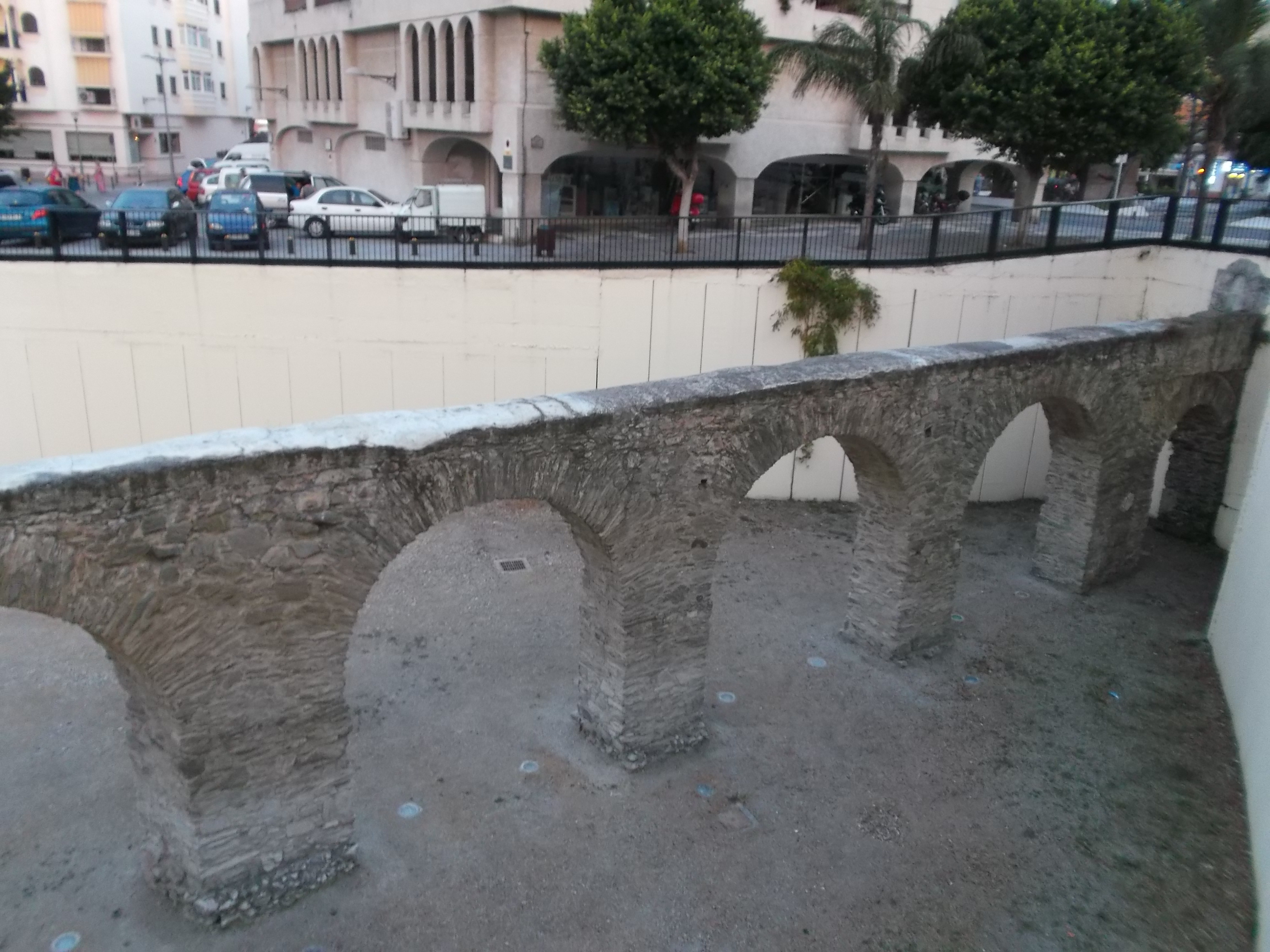 Vista del acueducto romano en Almuñécar.